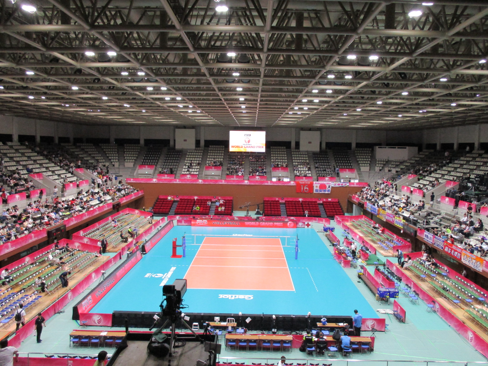 Jawa: 京都府立体育館のアリーナ部